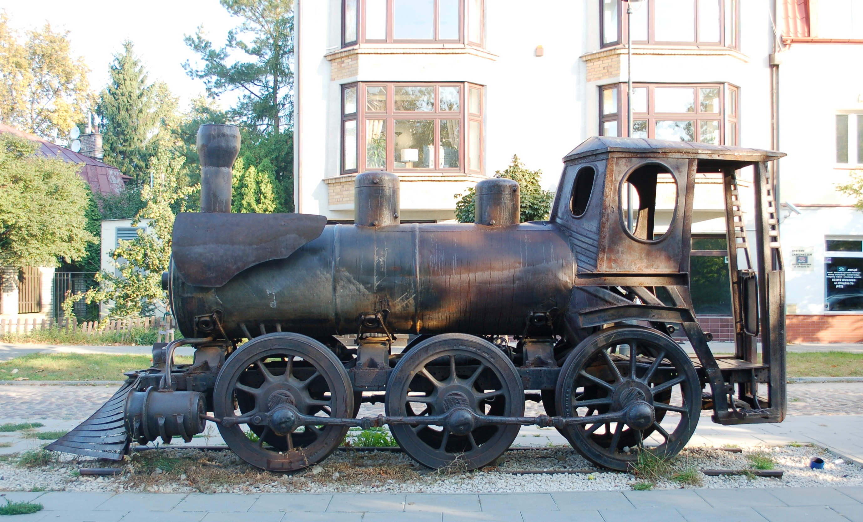 Sadyba, Denkmal für ehemalige Schmalspurbahnstrecke Warschau-Piasezcno-Grojec